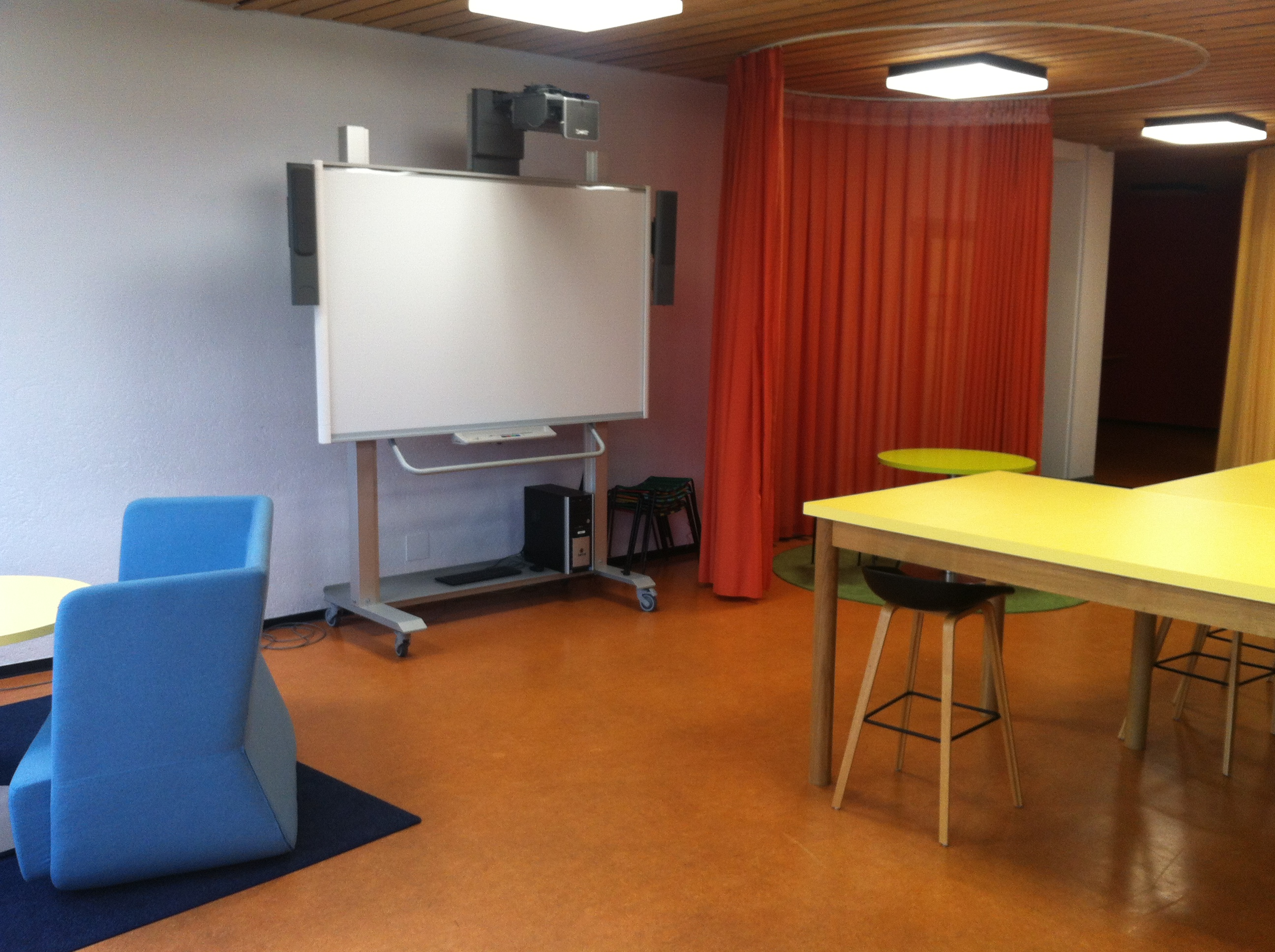 ASW Alemannenschule (Gemeinschaftsschule) in Wutöschingen im Landkreis Waldshut in Baden-Württemberg. (Inputraum)